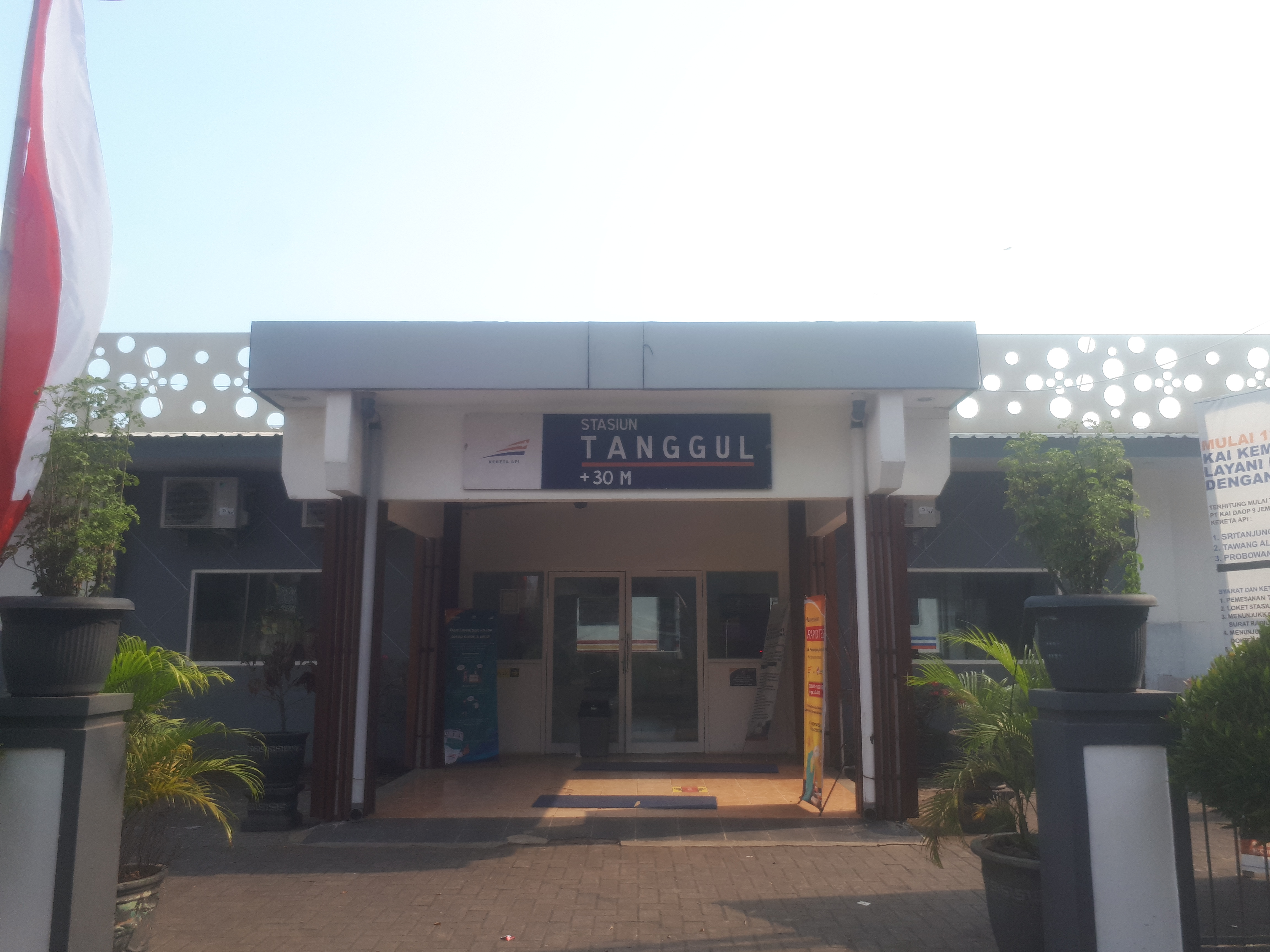 Tampak depan Stasiun Tanggul, 2020